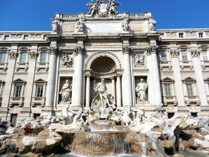 Roma - Fontana di Trevi